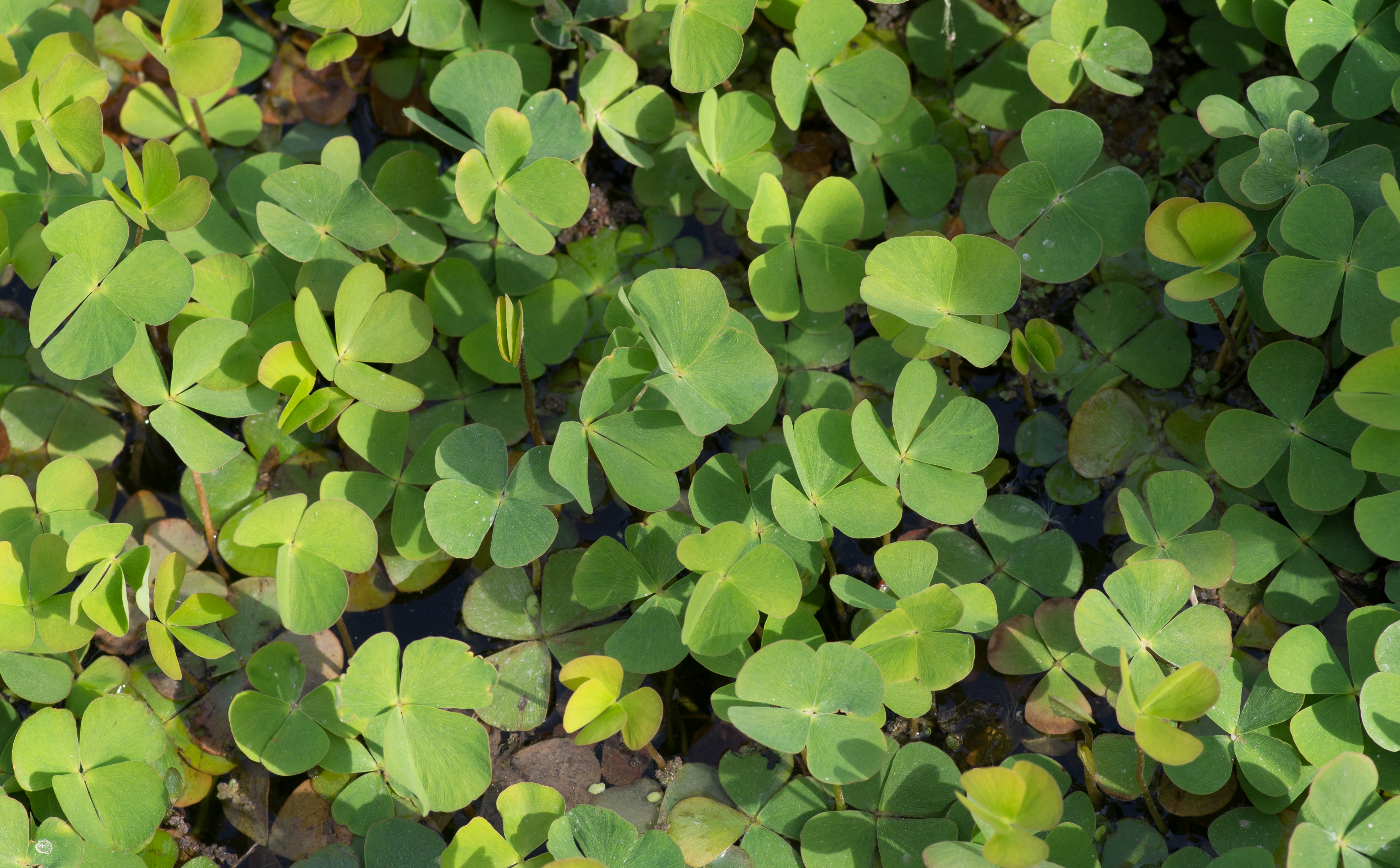 Marsilea quadrifolia - Jardin des Plantes